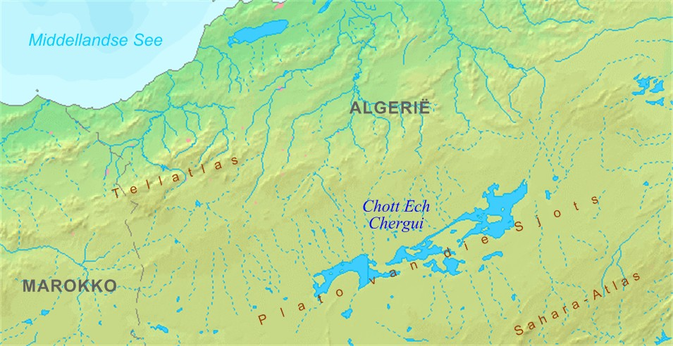 'n Kaart van die Chott Ech Chergui in Algerië.